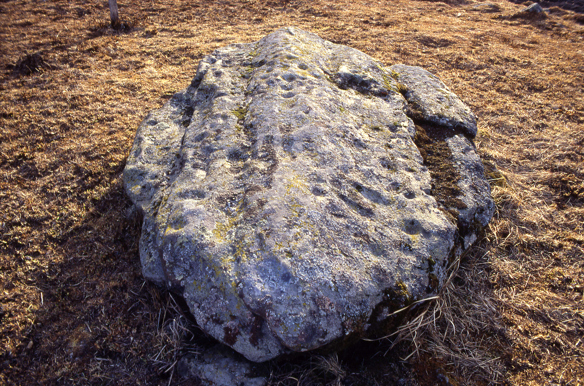 Takblocket på Slutarpsdösen (RAÄ-nr Kinneved 21:1) utanför Slutarp, Kinneveds socken, Frökinds härad, Falköpings kommun, f.d. Skaraborgs län, Västergötland. Västra Götalands län, Sverige. Takblocket har ca 100 skålgropar och en del andra enkla hällristningar som fotsulor och rännor. Takblocket är av glimmerskiffer och är därför mycket ömtåligt. Slutarpsdösen är en megalitgrav C14-daterad till 3350-3100 f.Kr., d.v.s. till mellanneolitikum.